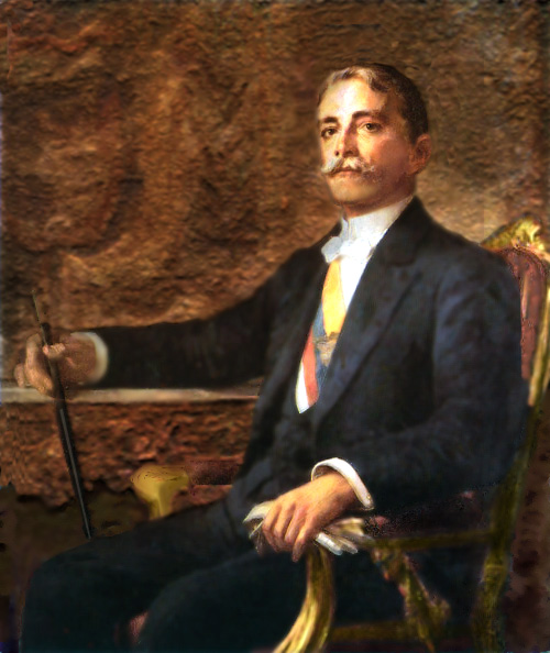 Carlos Eugenio Restrepo, persident of Colombia, 1910-1914.